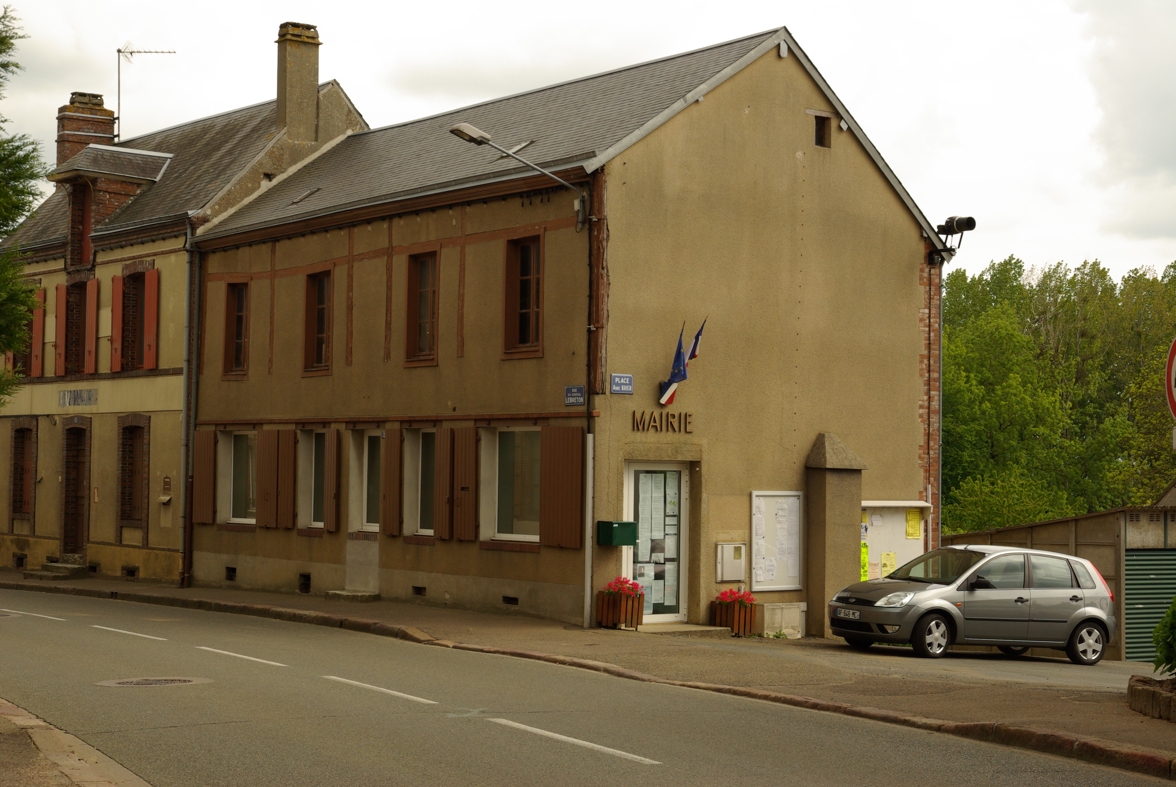 Gemeentehuis van Luigny